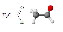 Acetaldehyde, structure formula and 3D model drawn by Paginazero